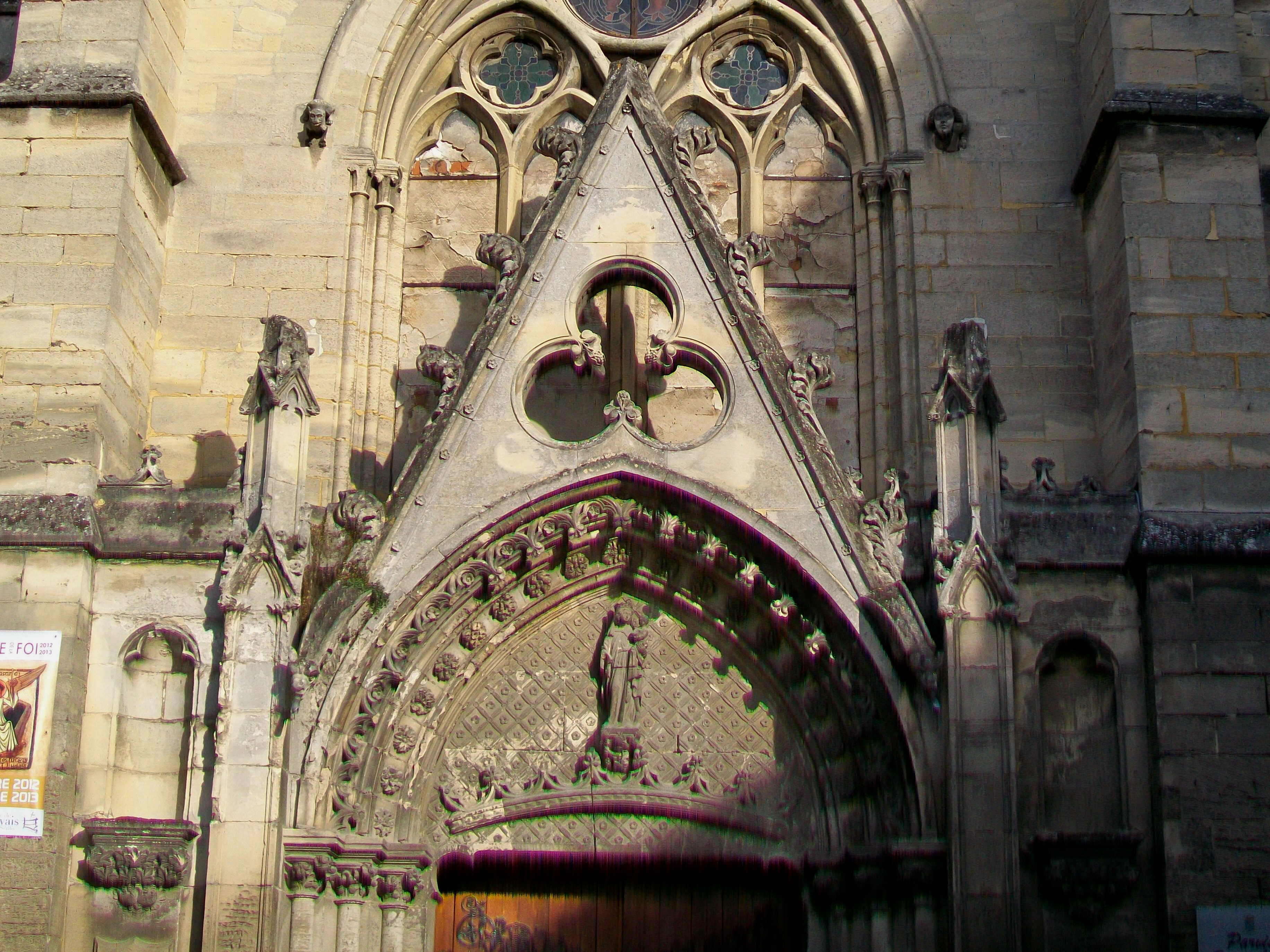 Détail du portail occidental : tympan et gable.